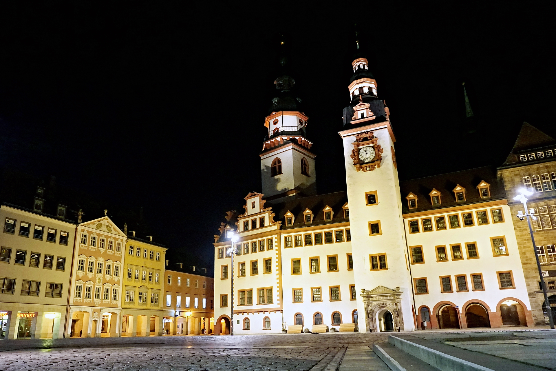 Altes Rathaus und Siegertsches Haus am Marktplatz in Chemnitz